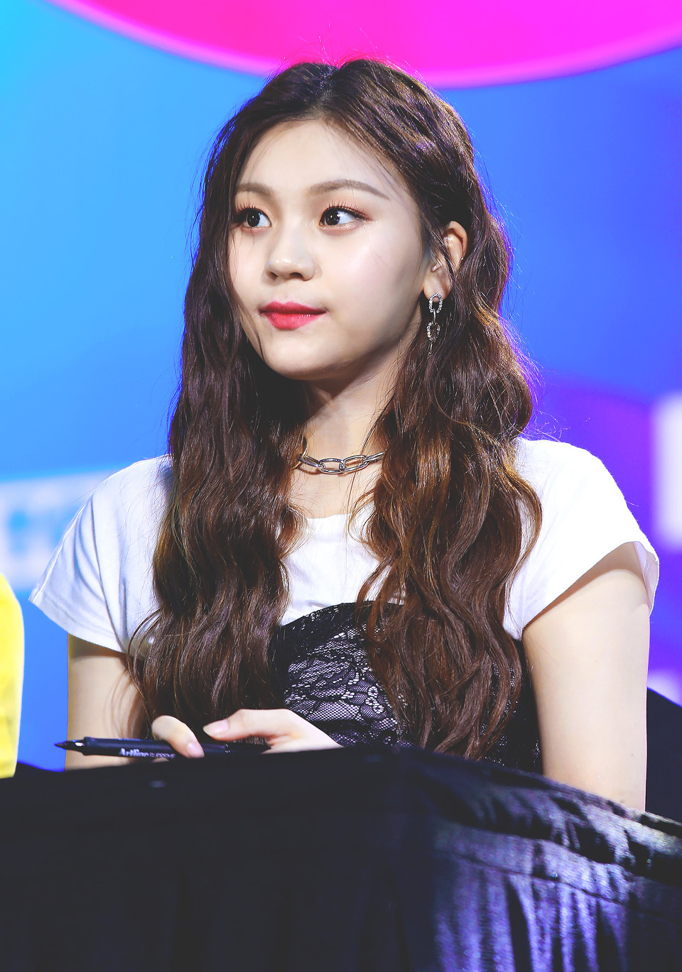 2019.09.28 VHEARTBEAT 엄지 (4)